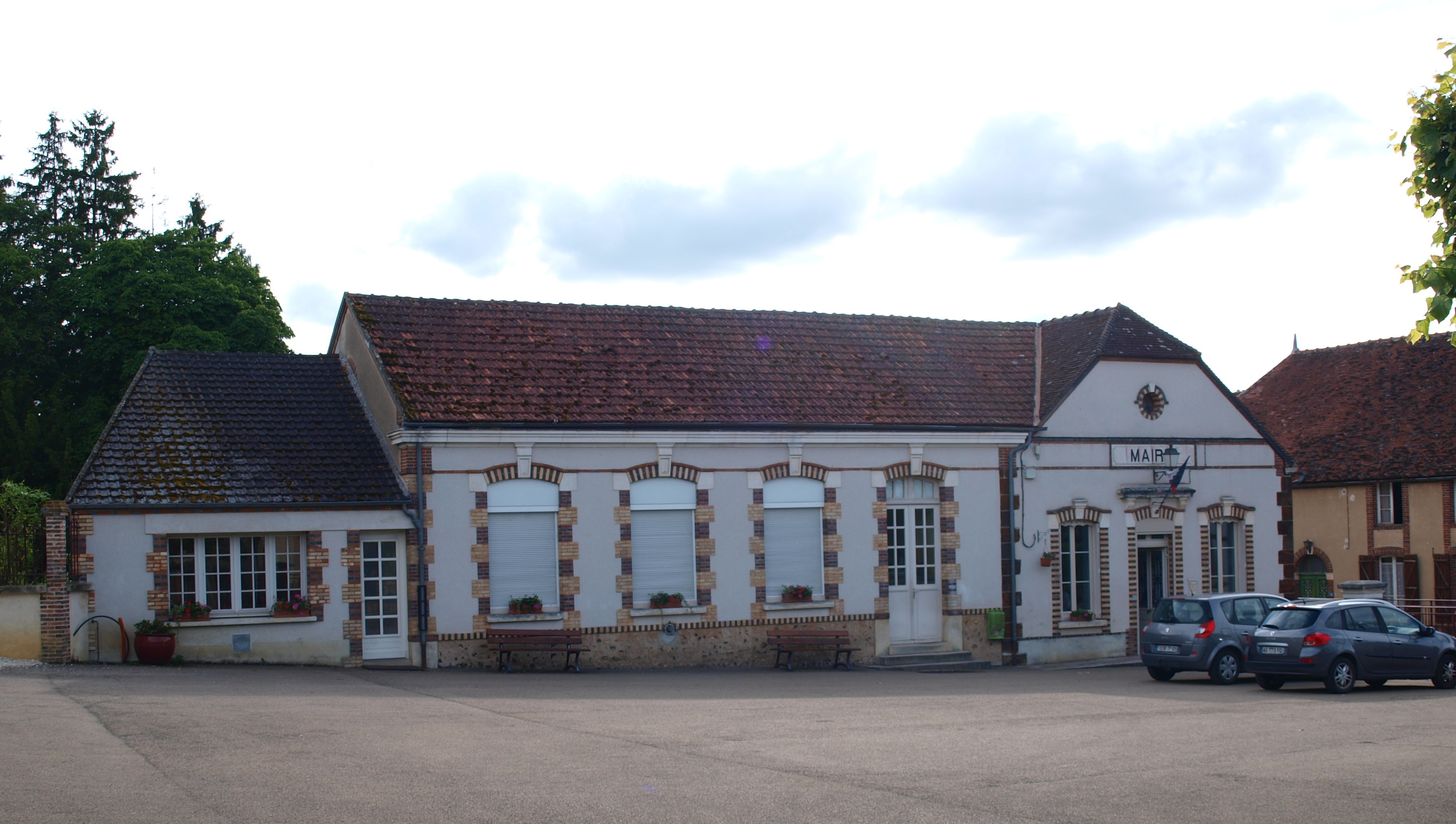 Saint-Maurice-le-Vieil (Yonne, France) , mairie-école